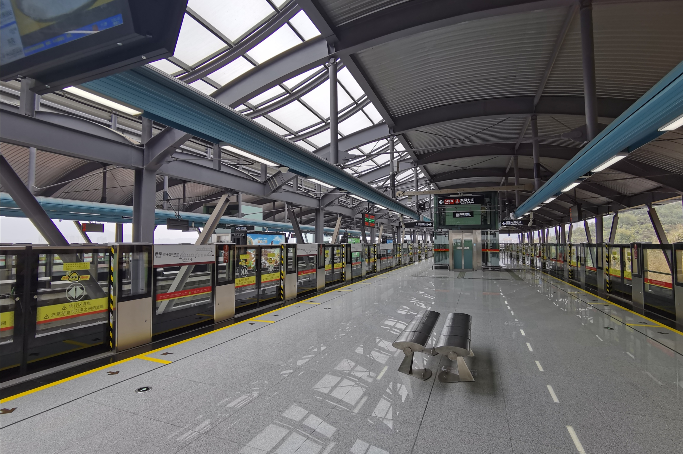 广州地铁赤草站